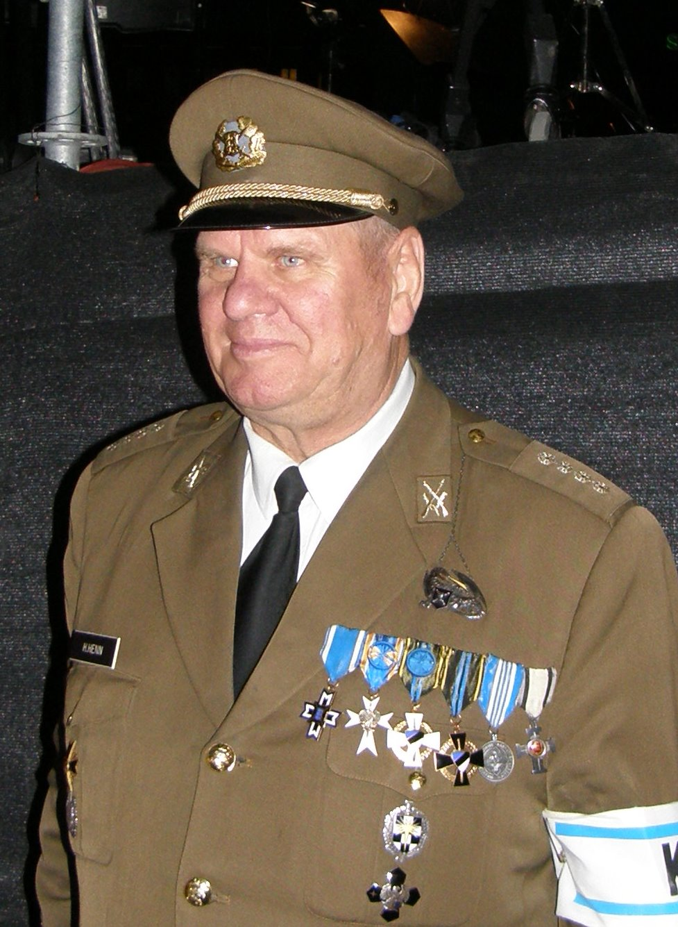 Harri Henn Vabadussõja Võidusamba avamisel